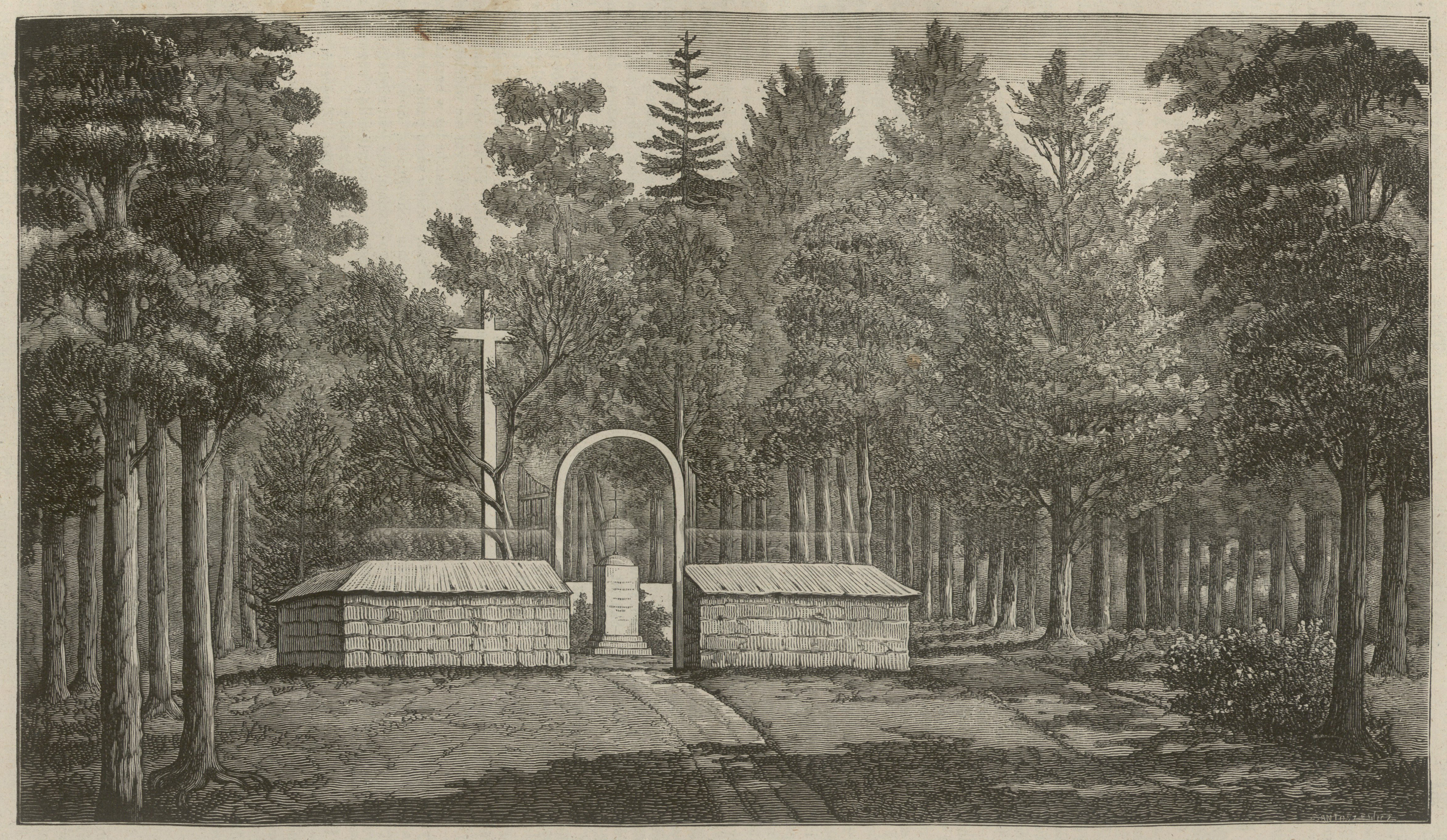 Беларуская (тарашкевіца): Яшуны (Jašuny). Магіла Яна Сьнядэцкага